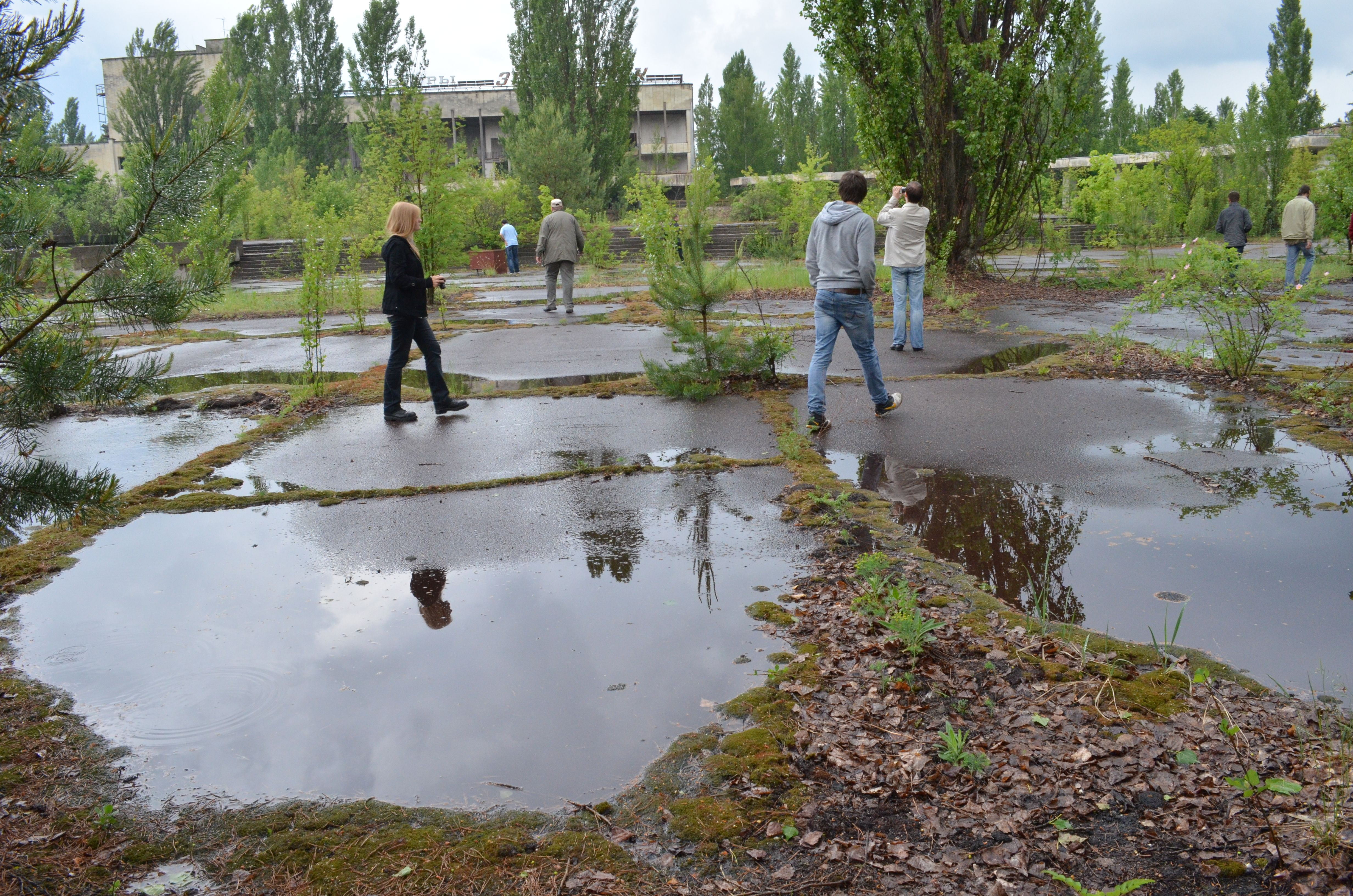 Вікіекспедиція до Чорнобиля 2013